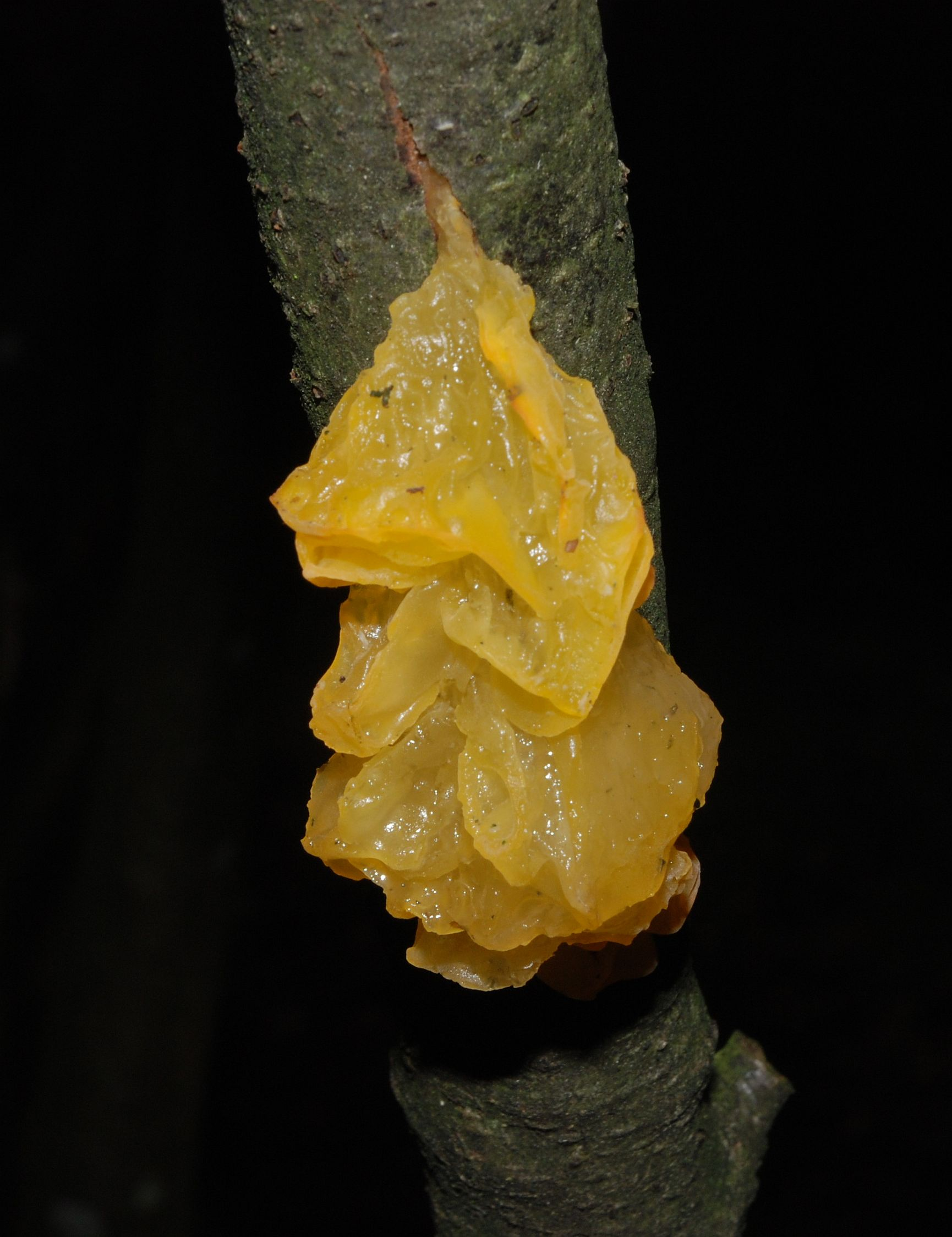 Tremella mesenterica, Near Molln, Upper Austria, Austria